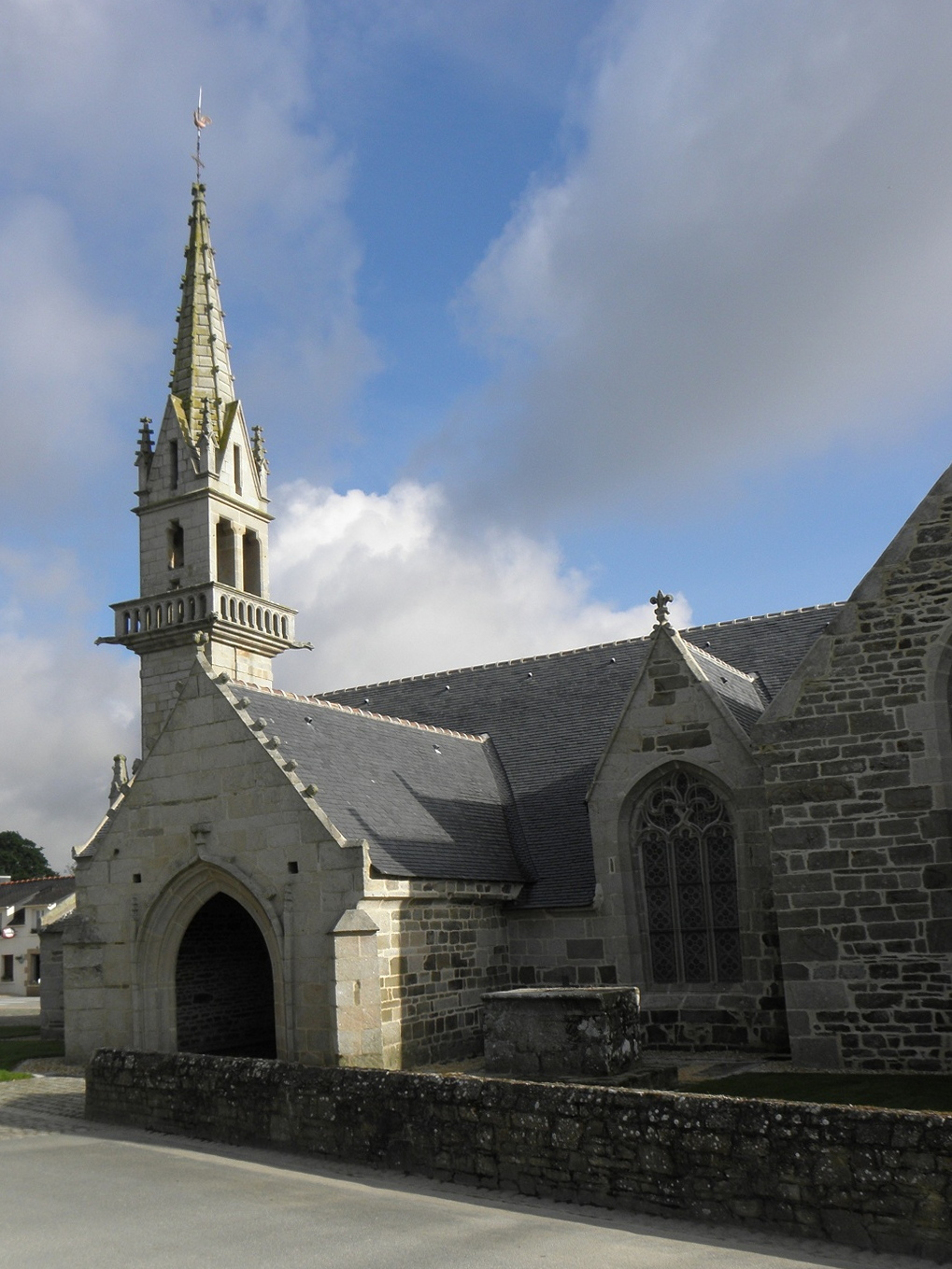 Clocher et flanc sud de la nef de l'église Saint-Trémeur de Kergloff (29).